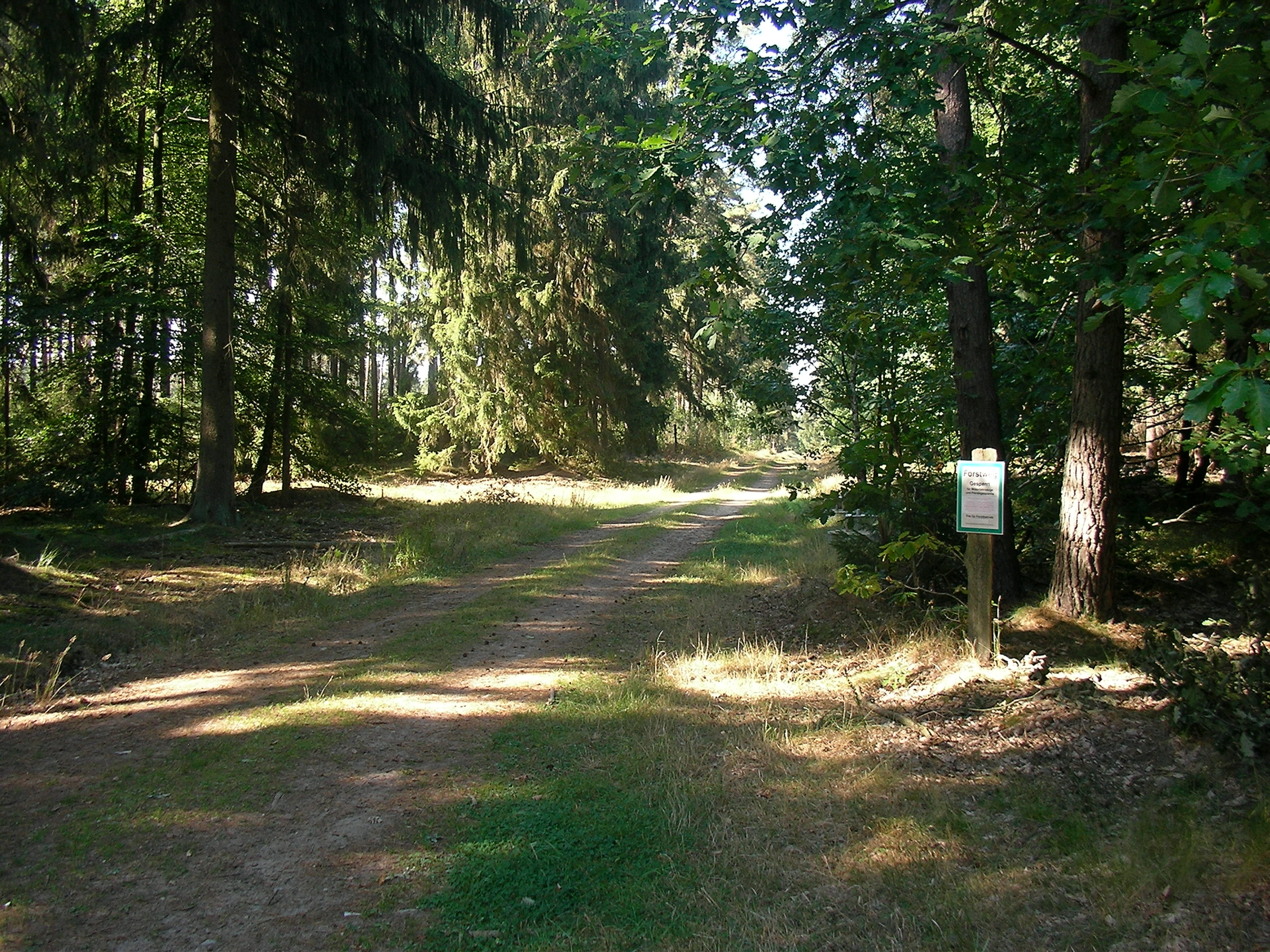 Göhrde-Morde: Forstweg zu den Jagen 147 und 138 (gegenüber dem Parkplatz nahe dem Forsthaus Röthen)